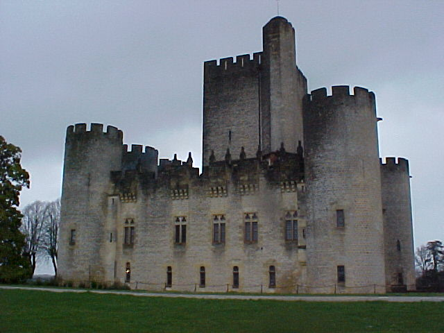 Roquetaillade